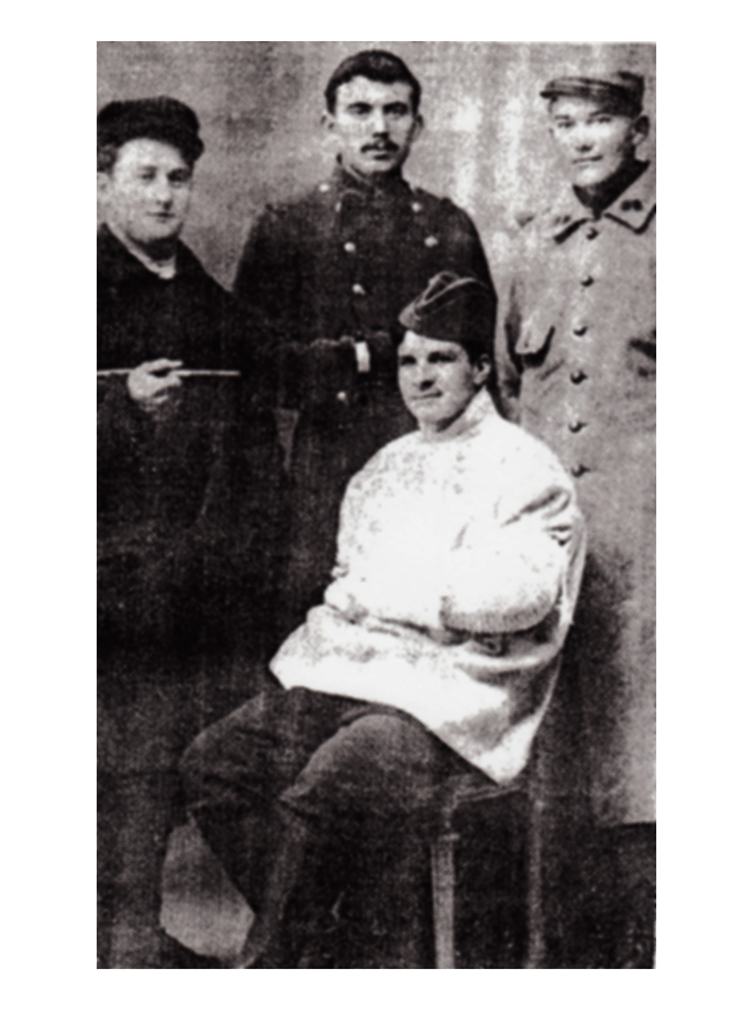 Tobías Bolaños Palma y Compañeros de la Aviación del Ejército Francés. Recuperación después de accidente, posando con compañeros de la aviación francesa.